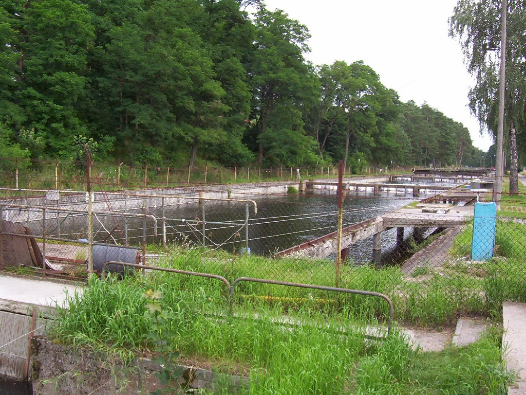 Zapora, zakład hodowli pstrąga